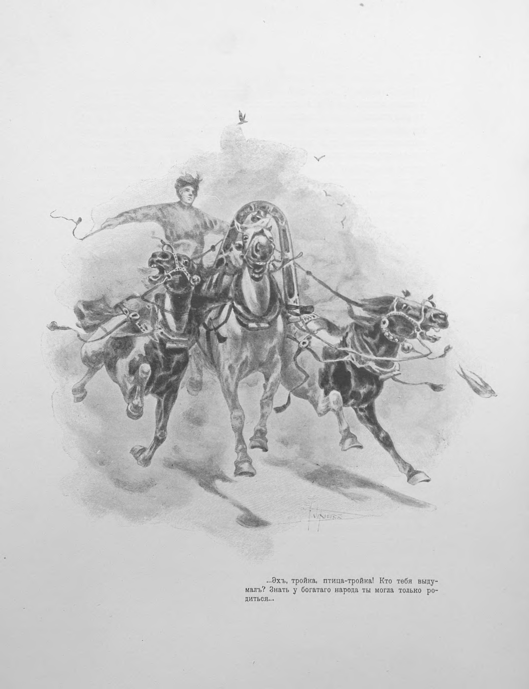 Н.В.Гоголь. Мертвые души